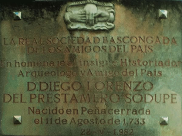 Placa de homenaje de Lorenzo Prestamero que se encuentra en la Iglesia de Peñacerrada (Álava)